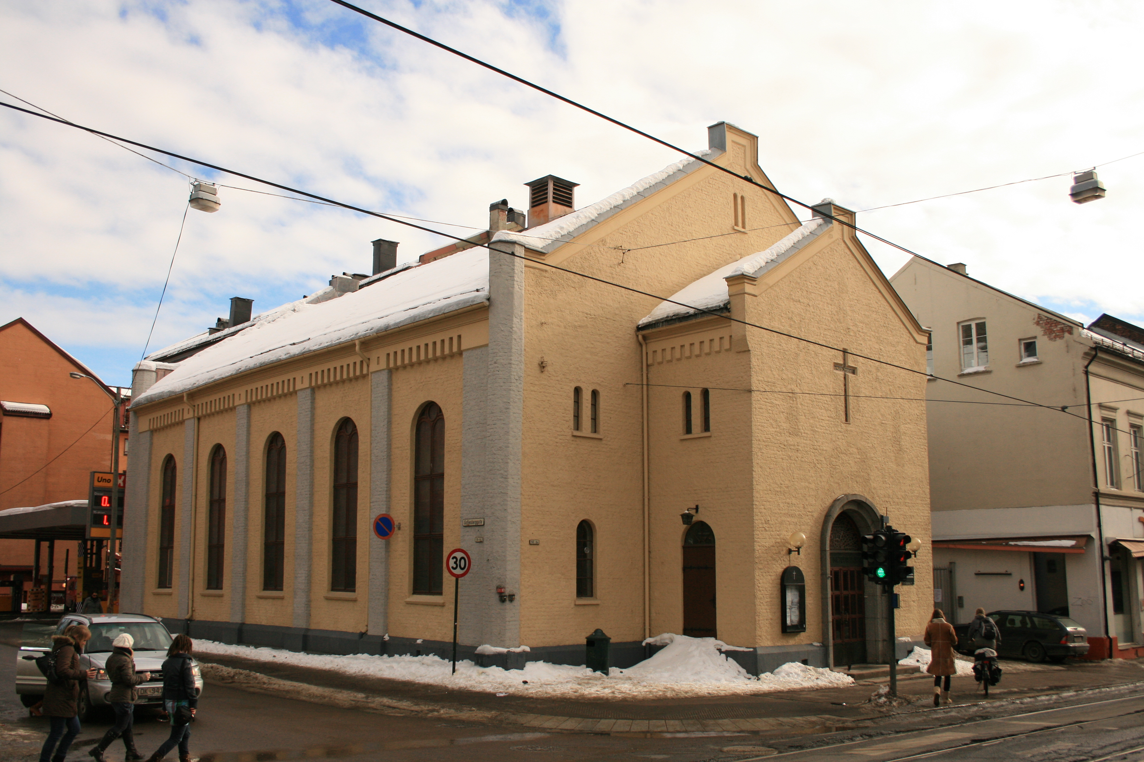 1. Metodistkirke, Thorvald Meyers gate 56A, Oslo